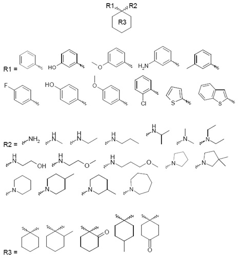 mogelijke analogen van PCP